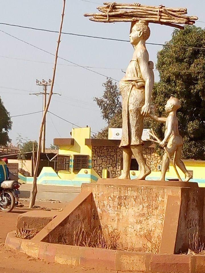 Vue de profil Statut situé à Péhunco (ou Ouassa-Péhunco).